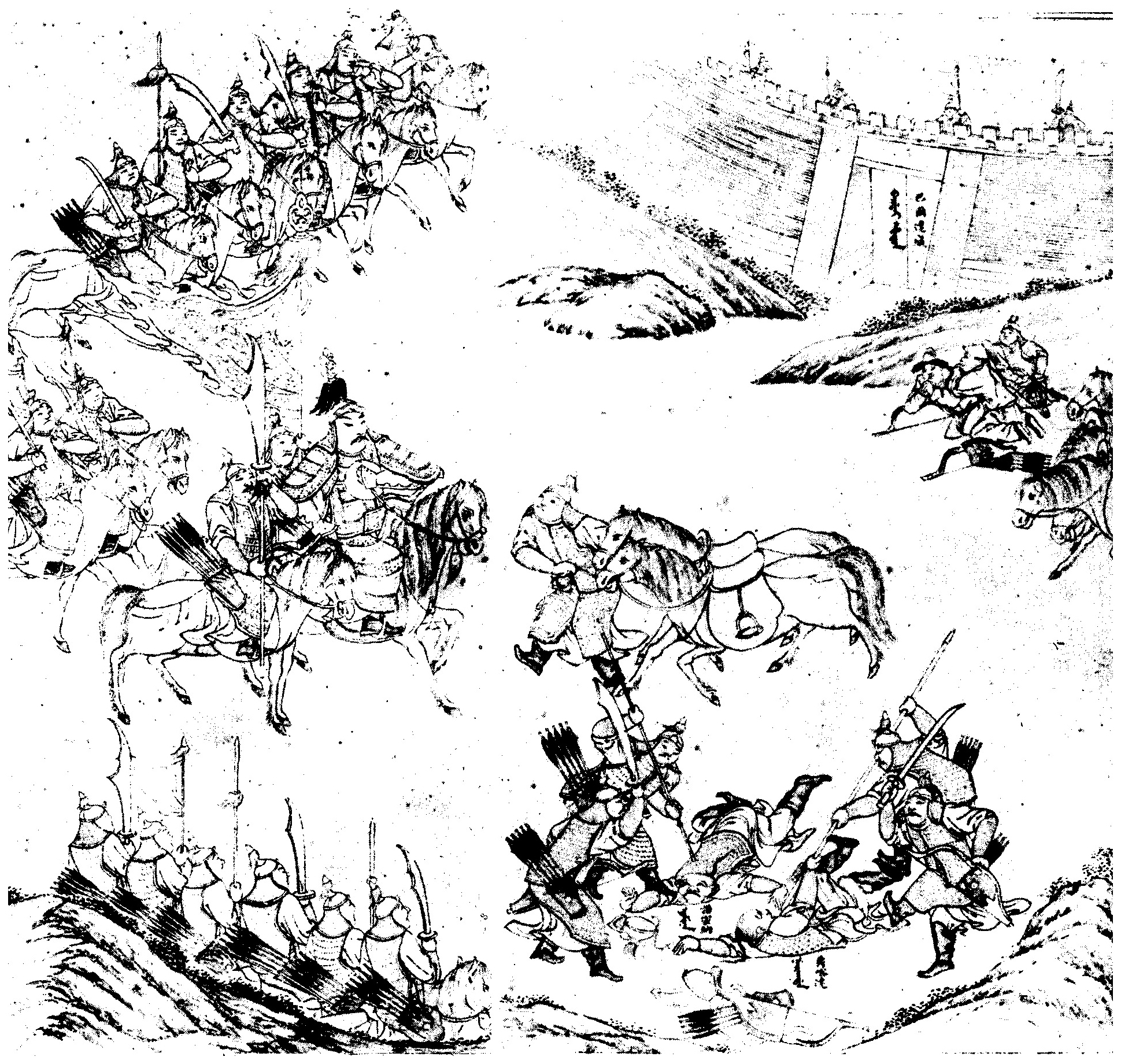 中文（台灣）: 弩尔哈齐計殺諾密納、鼐喀達